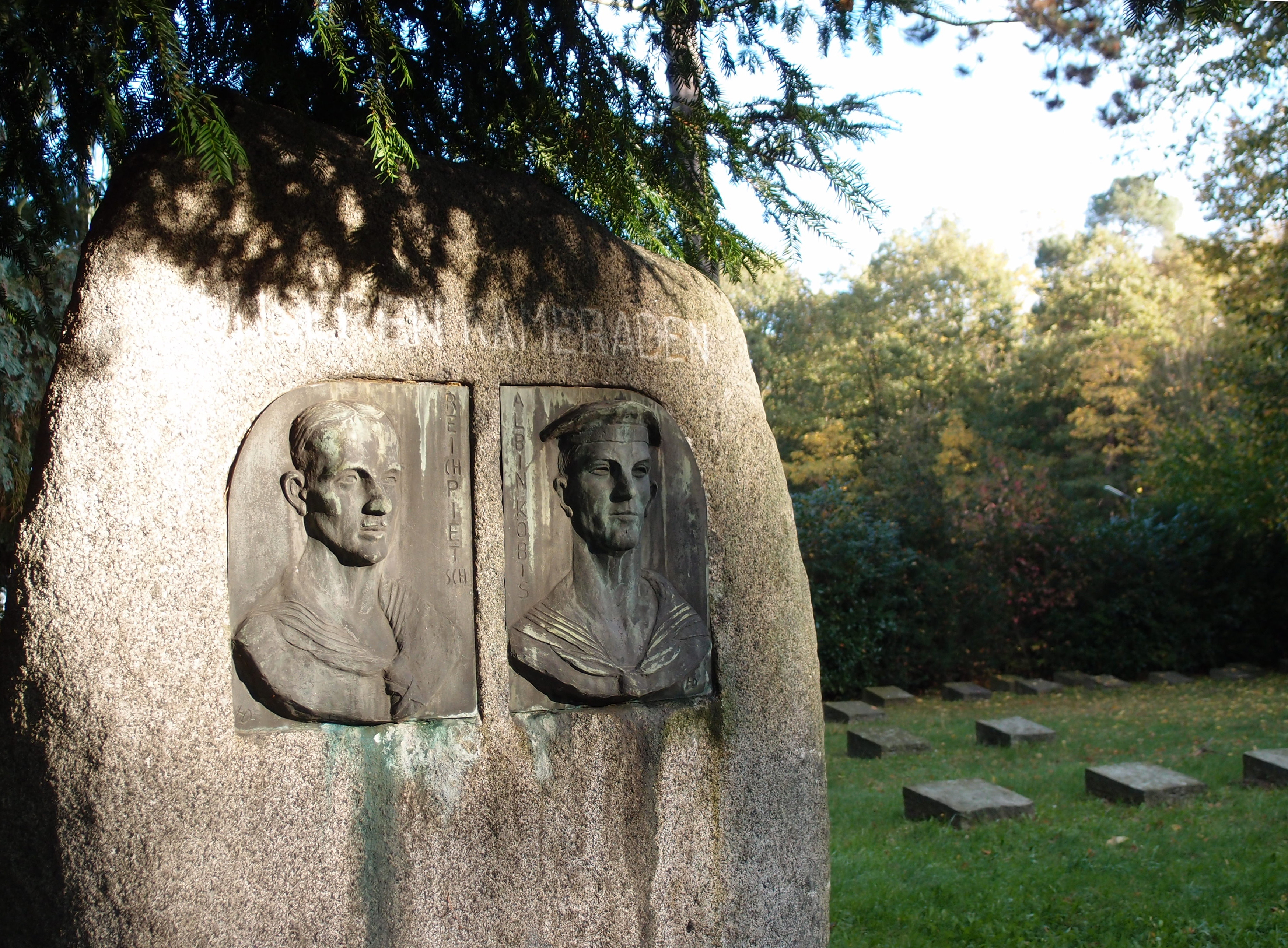 Grabmal für Albin Köbis und Max Reichpietsch (Teilansicht des Grabsteins in der Luftwaffenkaserne Wahn / Städt. Friedhof Köln) Datum: 27.10.2012 Urheber: M. Pfeiffer alias Benutzer:Gordito1869 Quelle: Privates Fotoarchiv des Urhebers